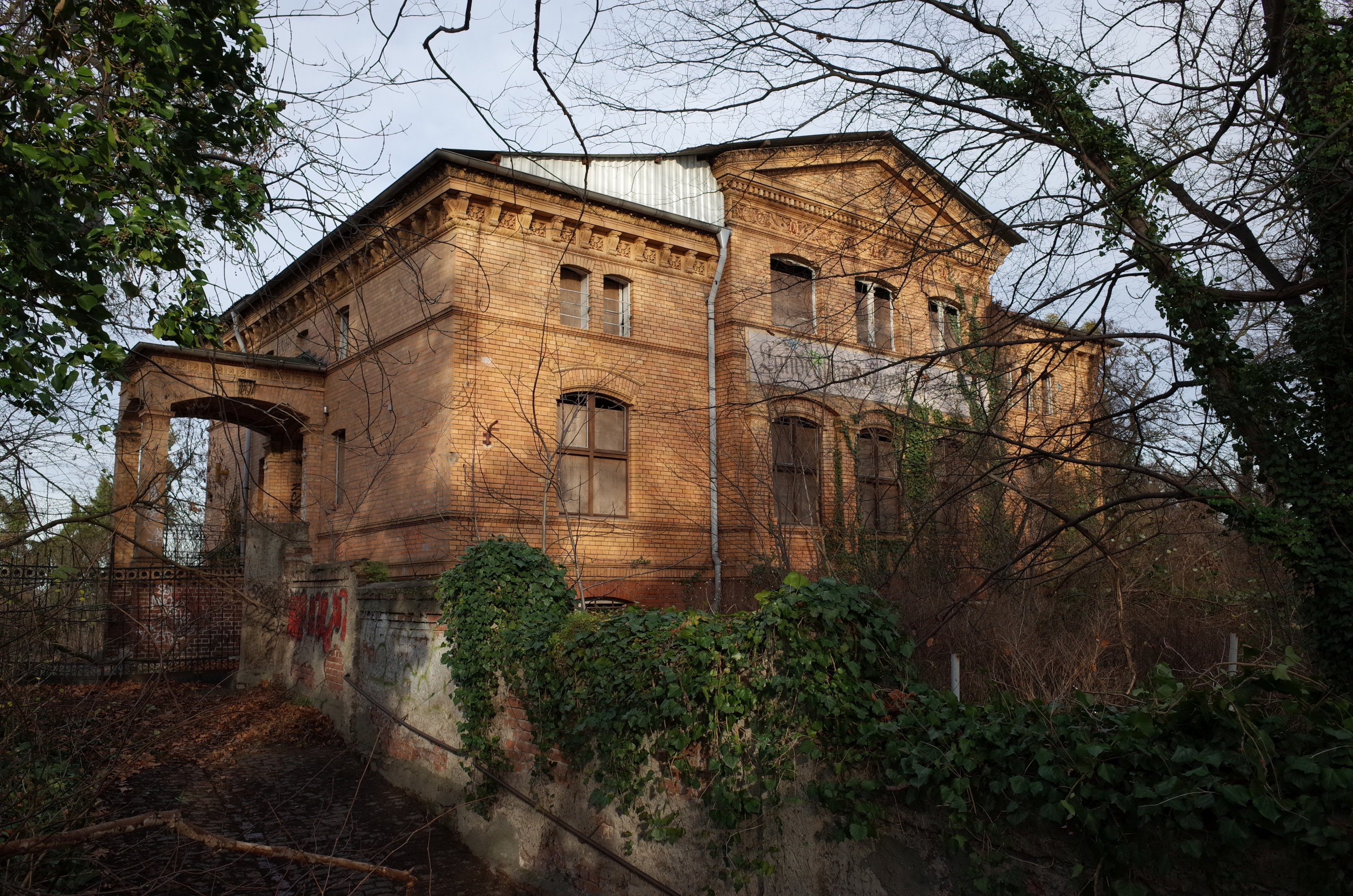 Dessau-Roßlau, Am Tivoli 1, Villa Kämmerer (Baudenkmal im Denkmalverzeichniss Sachsen-Anhalt, Erfassungsnummer: 094 40854 000 000 000 000 [1])